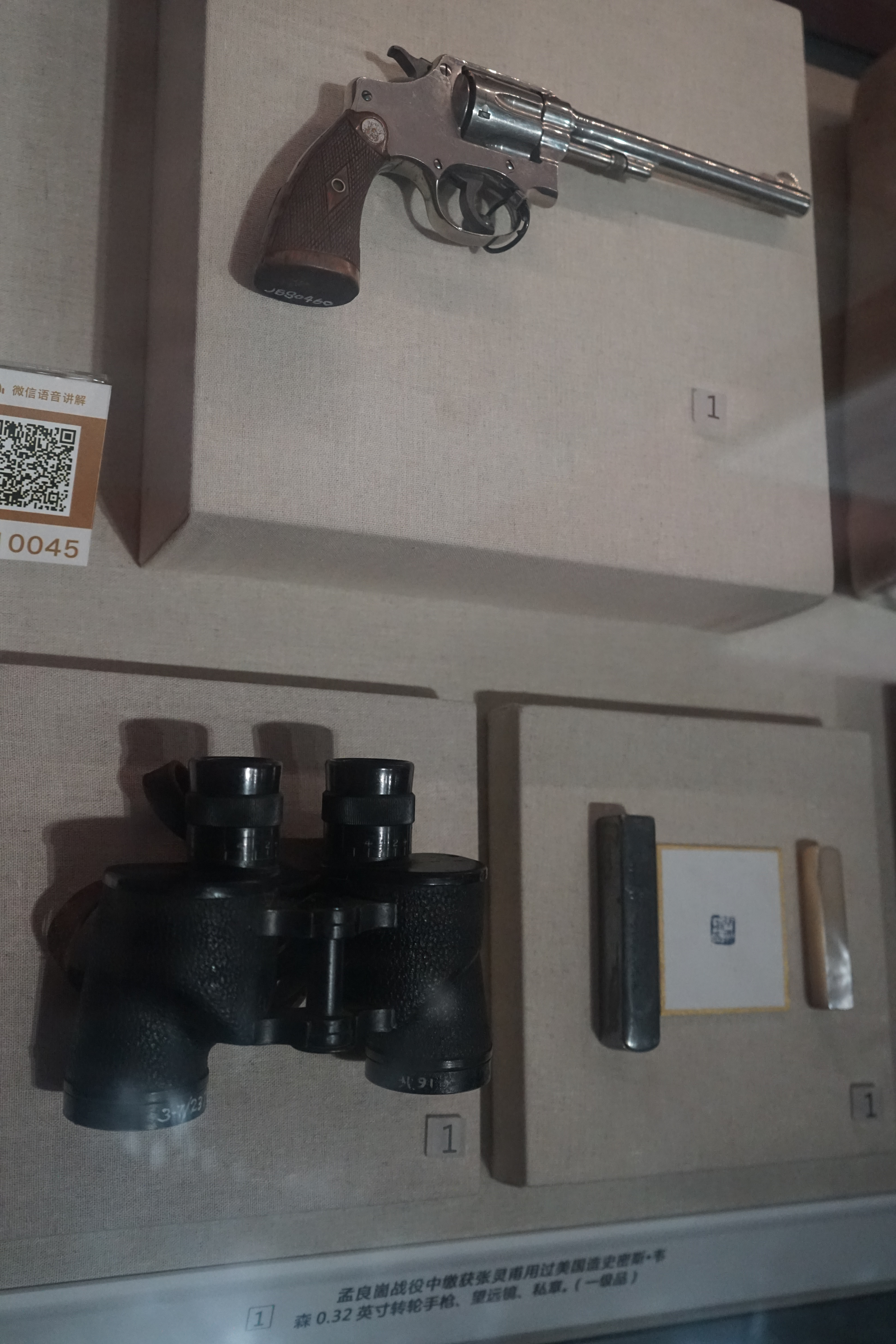 中文（中国大陆）: 孟良崮战役中缴获张灵甫用过的美国造史密斯·韦森0.32英寸转轮手枪、望远镜、私章。一级文物。